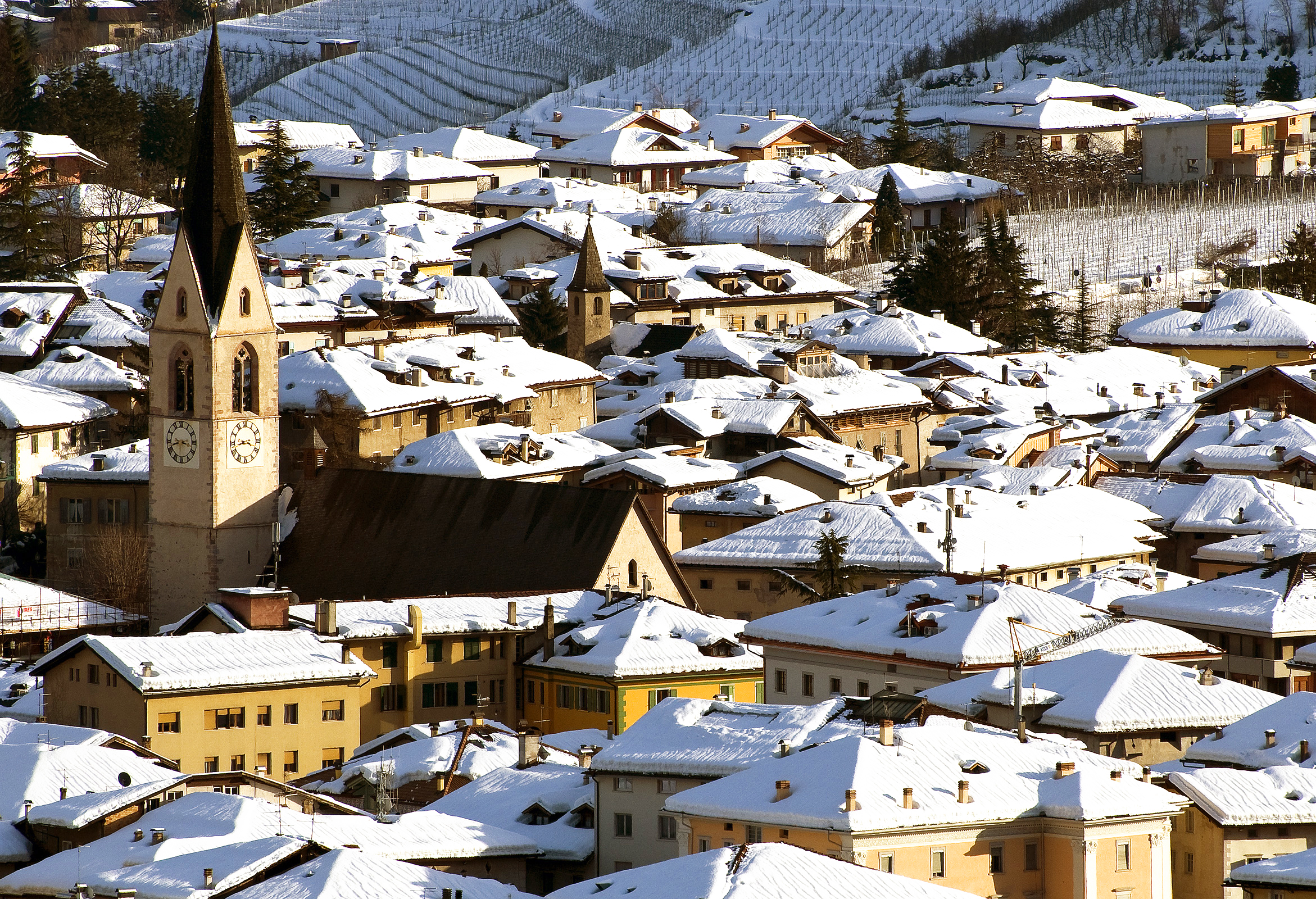 La chiesa di S.M.Assunta a Cles